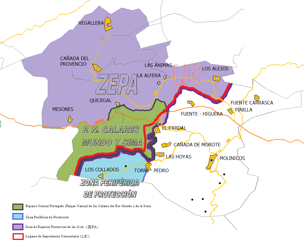 Mapa con los espacios naturales a los que pertenece el municipio de Molinicos (Albacete)